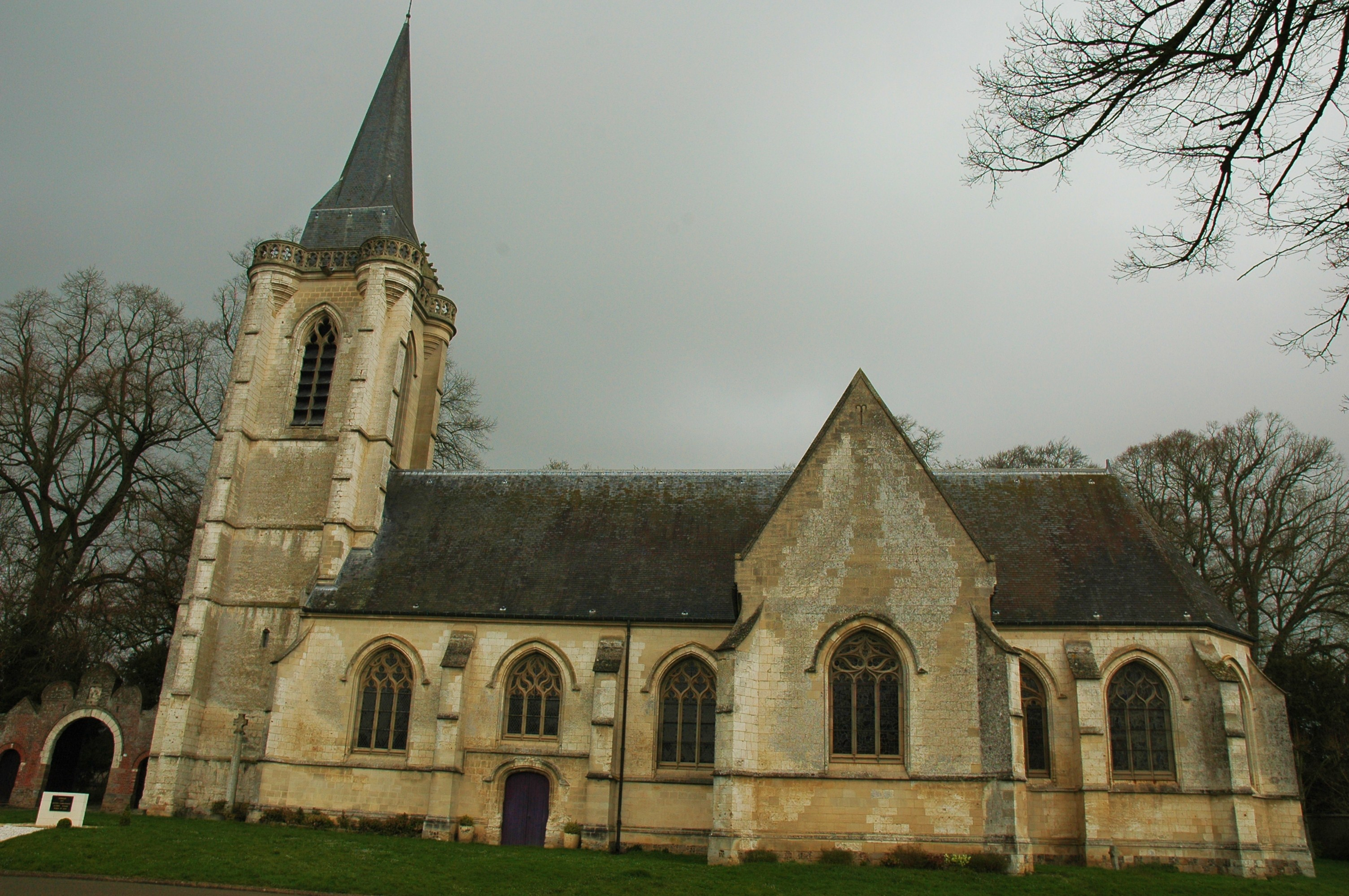 Huppy (Somme, France). L'église.